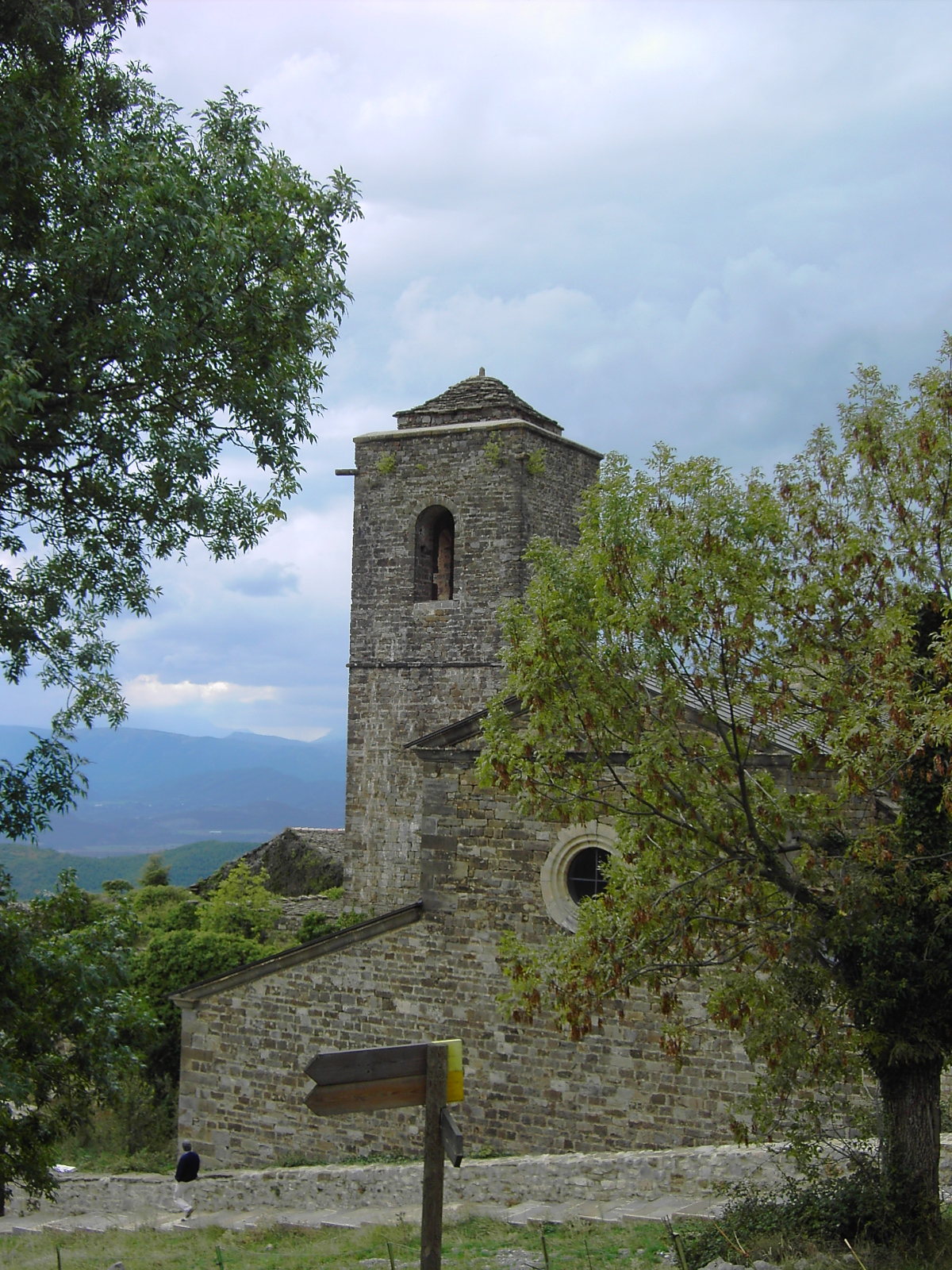 Fachada exterior de San Victorián, vista desde el camino que desciende de la La Espelunga.